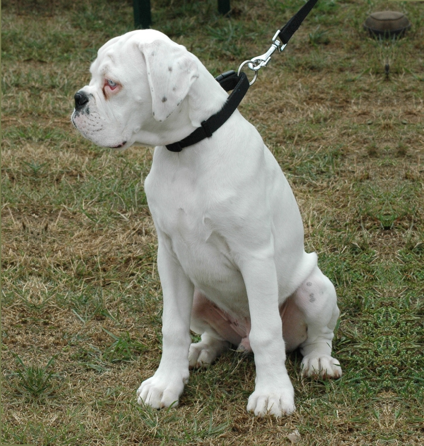 Dies ist das Bild eines Boxers mit der Fehlfarbe "Weiß", von einem im VDH "Verein Deutsche Hunde" zugelassenen Züchter!